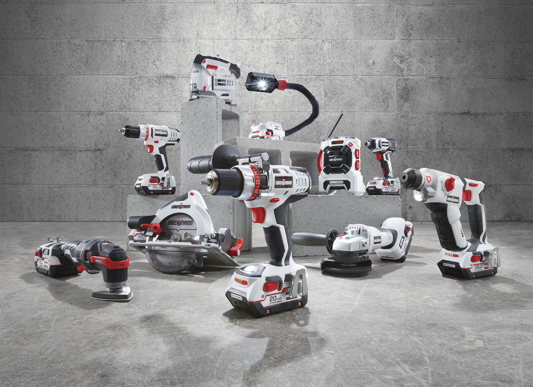 Grupo de herramientas Ubermann